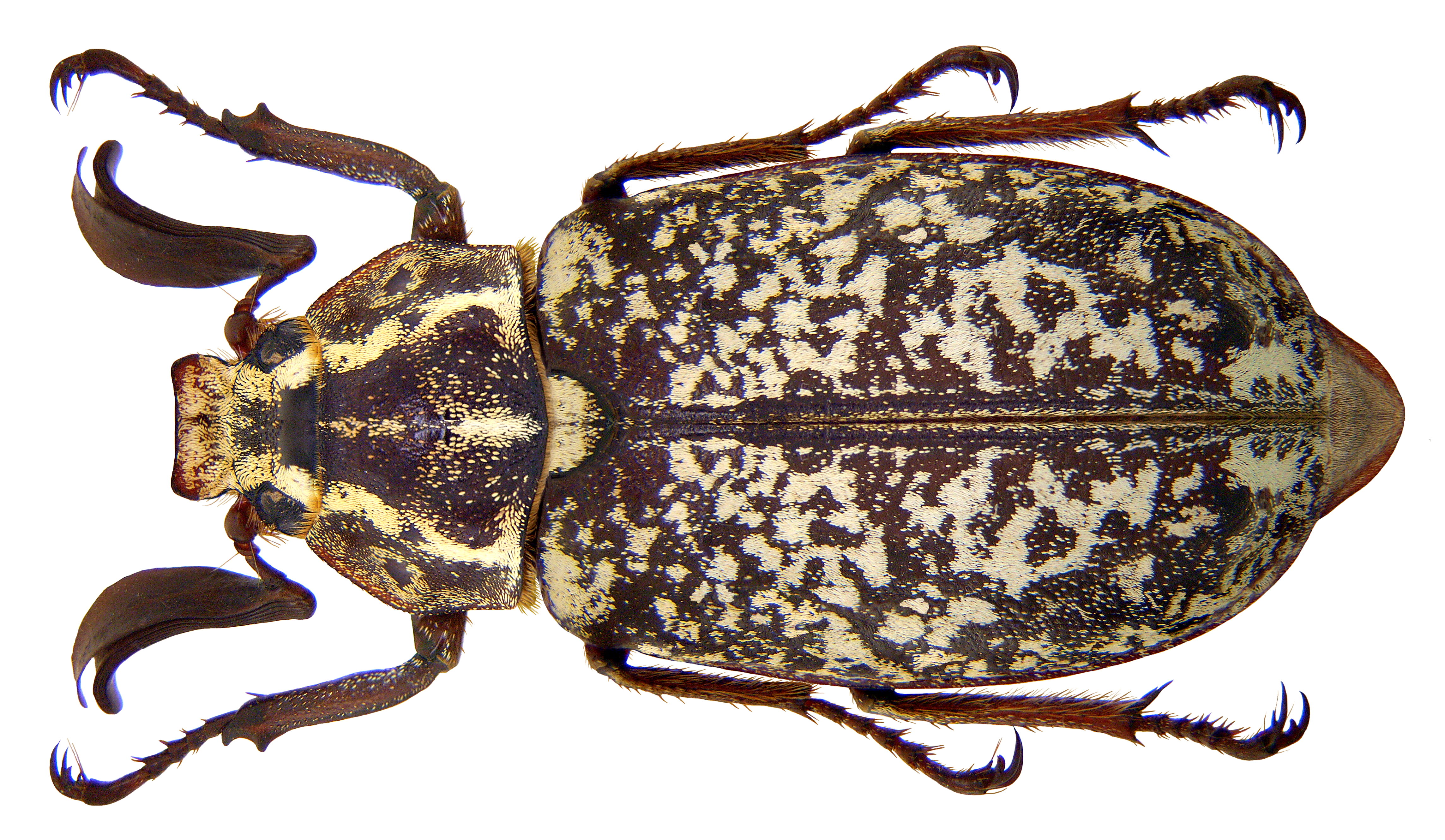 Familie: Scarabaeidae Groesse: 32 mm Verbreitung: Iran, Anatolien, Syrien, Armenien Fundort: Iran, Nord-Elburz, Prov. Manzandaran, Now Shahr leg. A.Skale, 2008; det. Rößner 2008 Photo: U.Schmidt, 2009